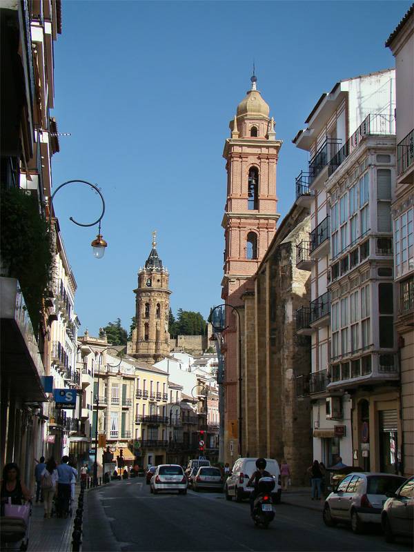 Calle Infante Don Fernando, Antequera, Andalucía, España.